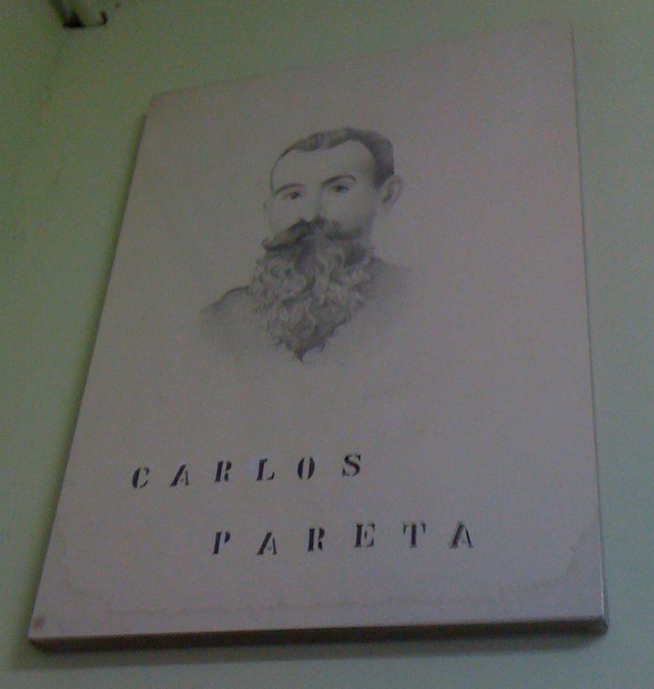 Carlos Pareta y Padrós